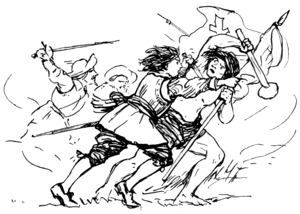 Ilustración de Catalina de Erauso, la Monja Alférez, luchando contra un mapuche en Chile. En revista chilena Pacifico Magazine.